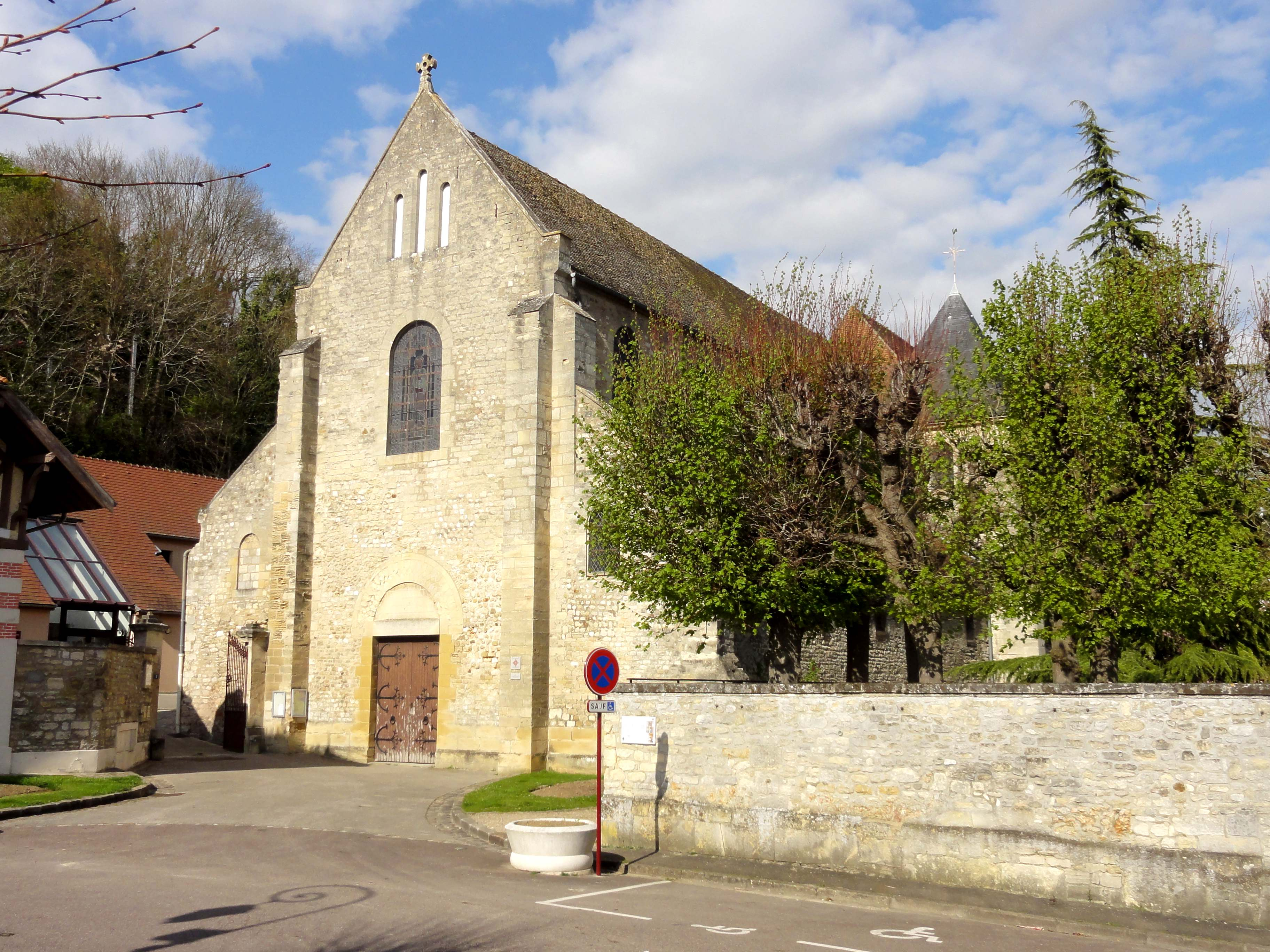 Église Saint-Michel de Juziers - voir titre.